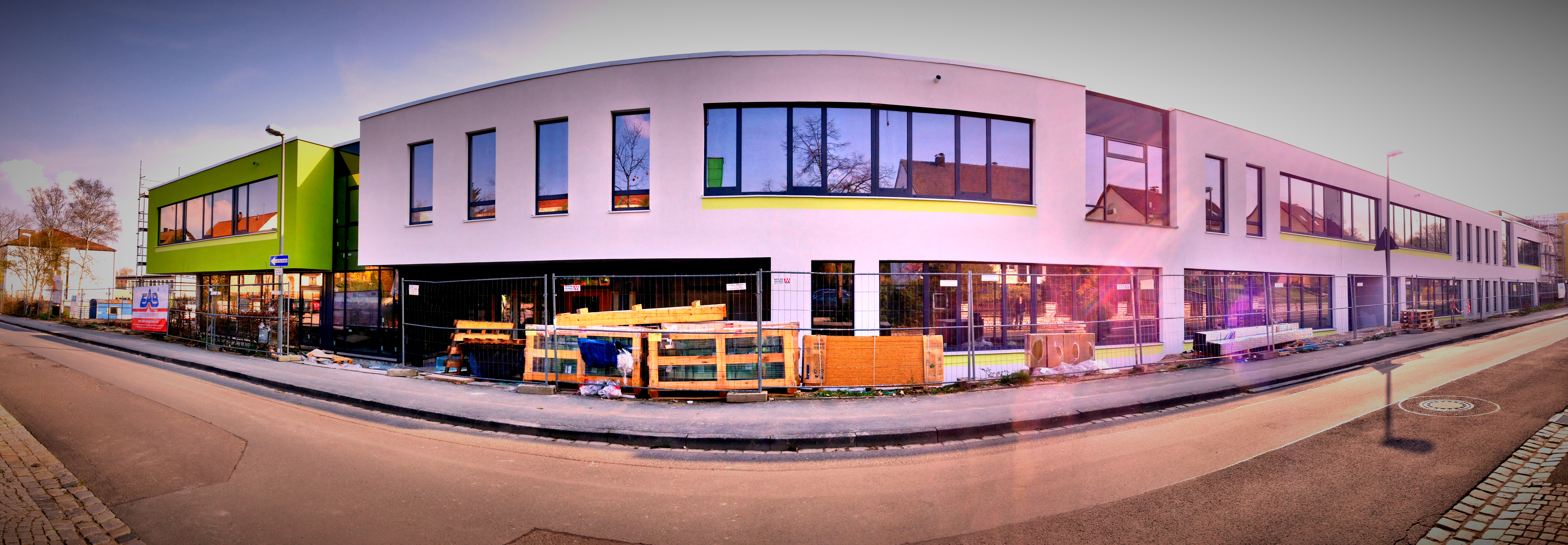 Baustelle des Nordbaus am Gymnasium Höchstadt a. d. Aisch im April 2014